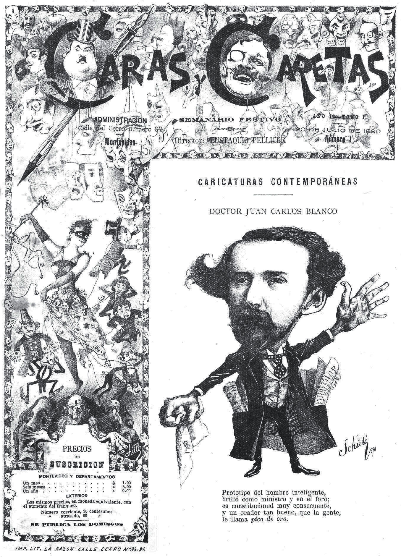 Portada de la publicación uruguaya Caras y Caretas, editada entre 1890 y 1897.